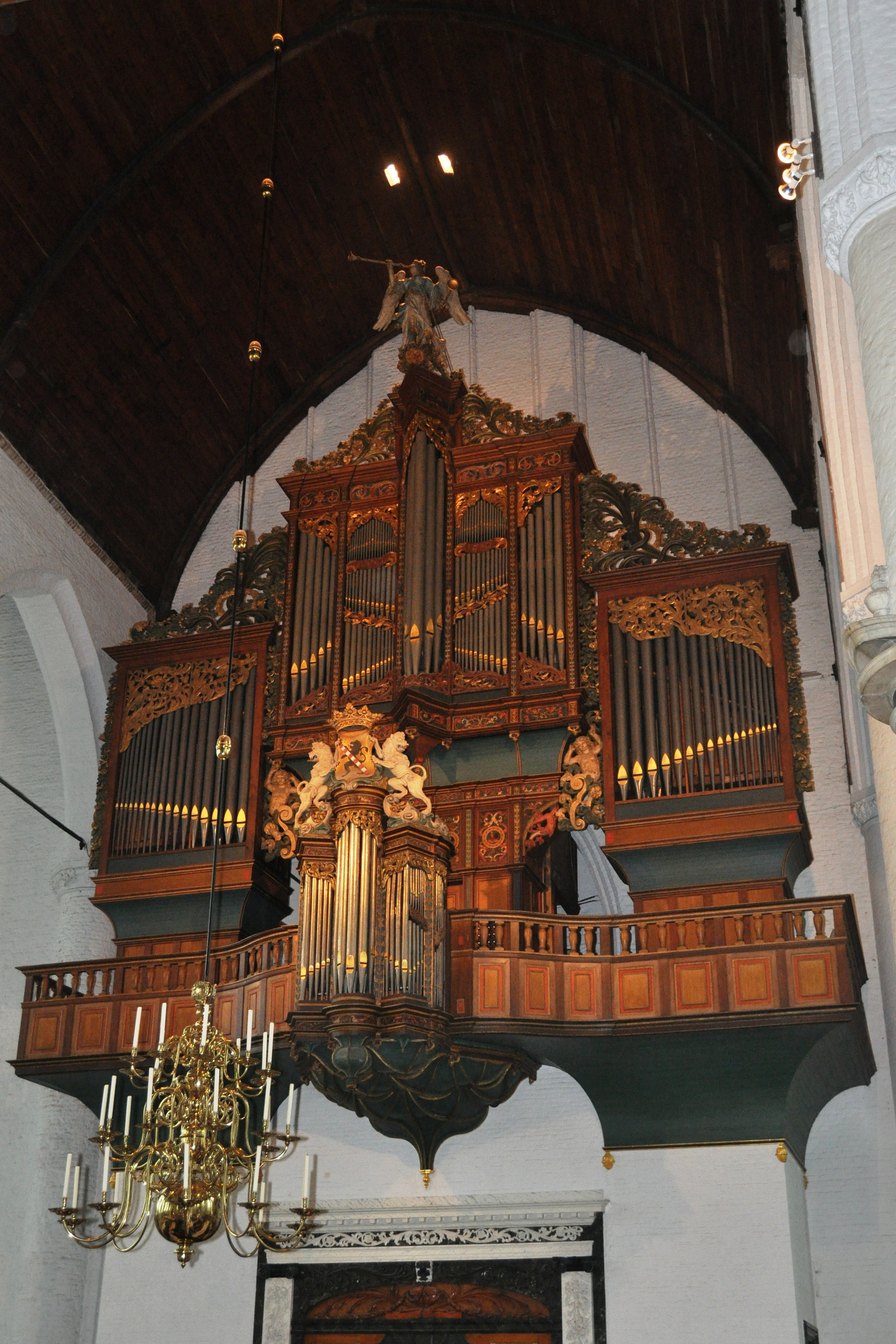 Interieur van de Grote of St. Janskerk in Schiedam.